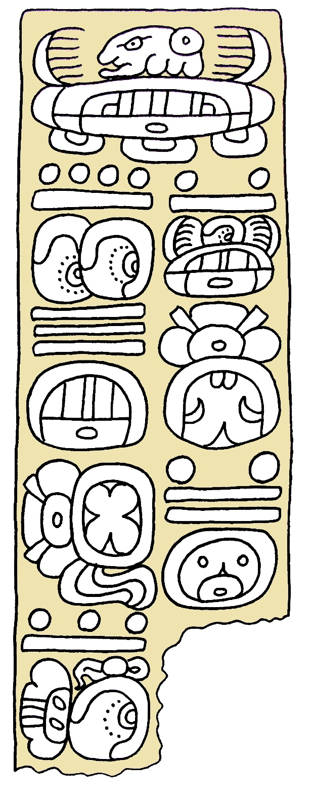 Cuenta Larga 9.7.15.0.0. de la estela de Ojo de Agua en Chiapas. Dibujado por Lacambalam.